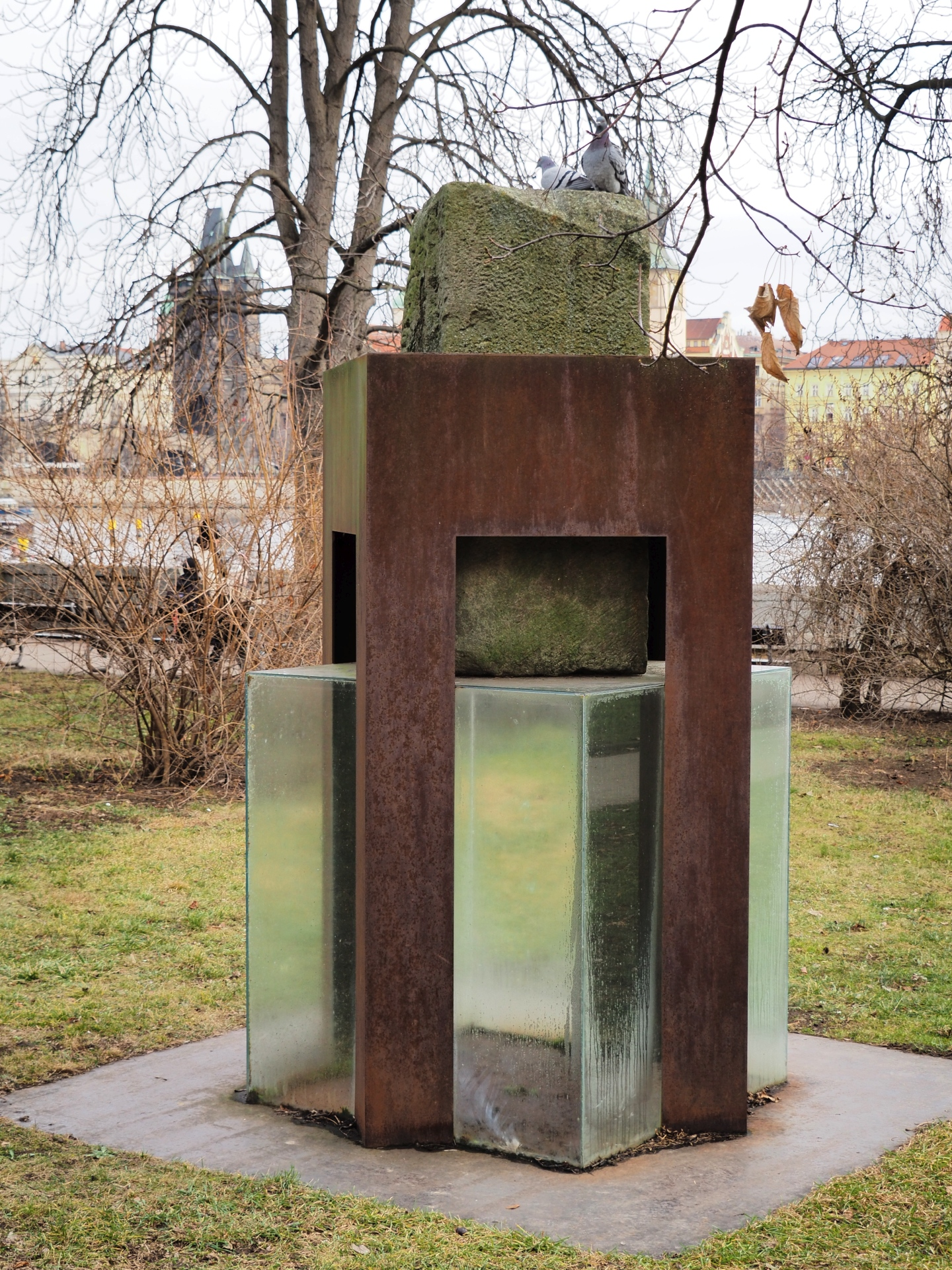 Skleněná skříň nese hrubě opracovaný blok pískovce, přidržovaný ocelovou čtyřnohou vzpěrou. Praha, Malá Strana. Instalována 2009